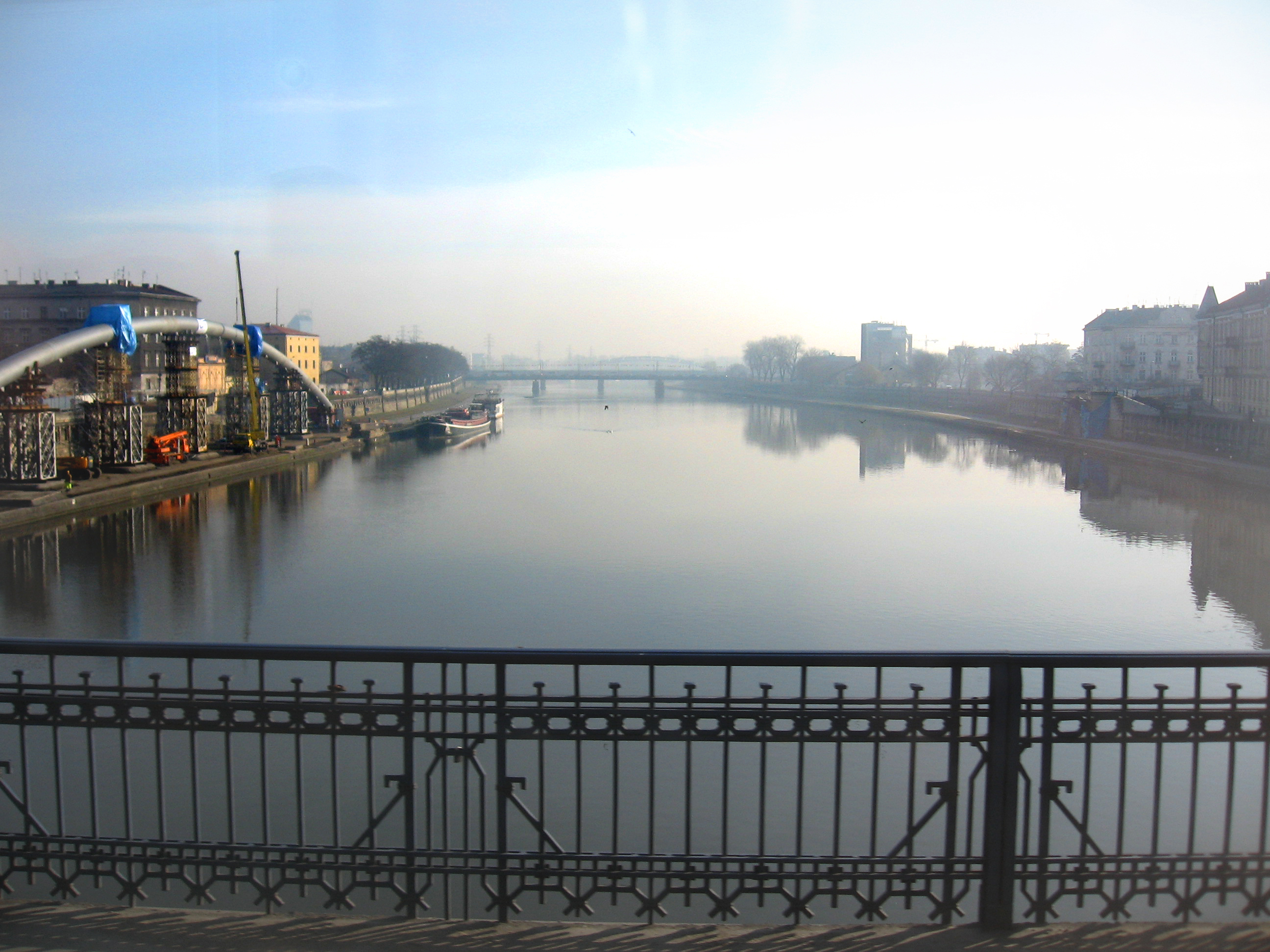 נהר הויסלה בצילום מגשר בקרקוב